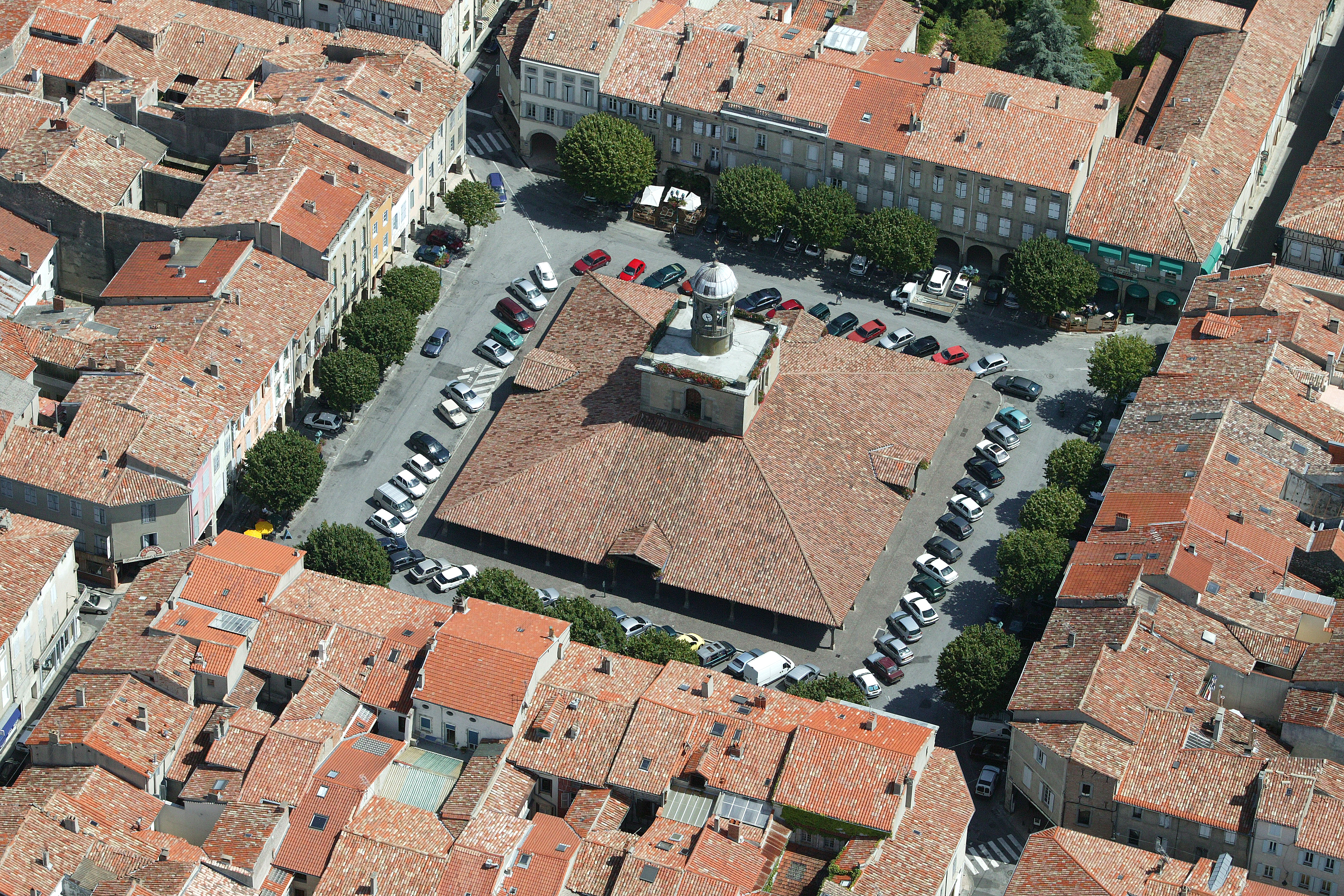 revel2